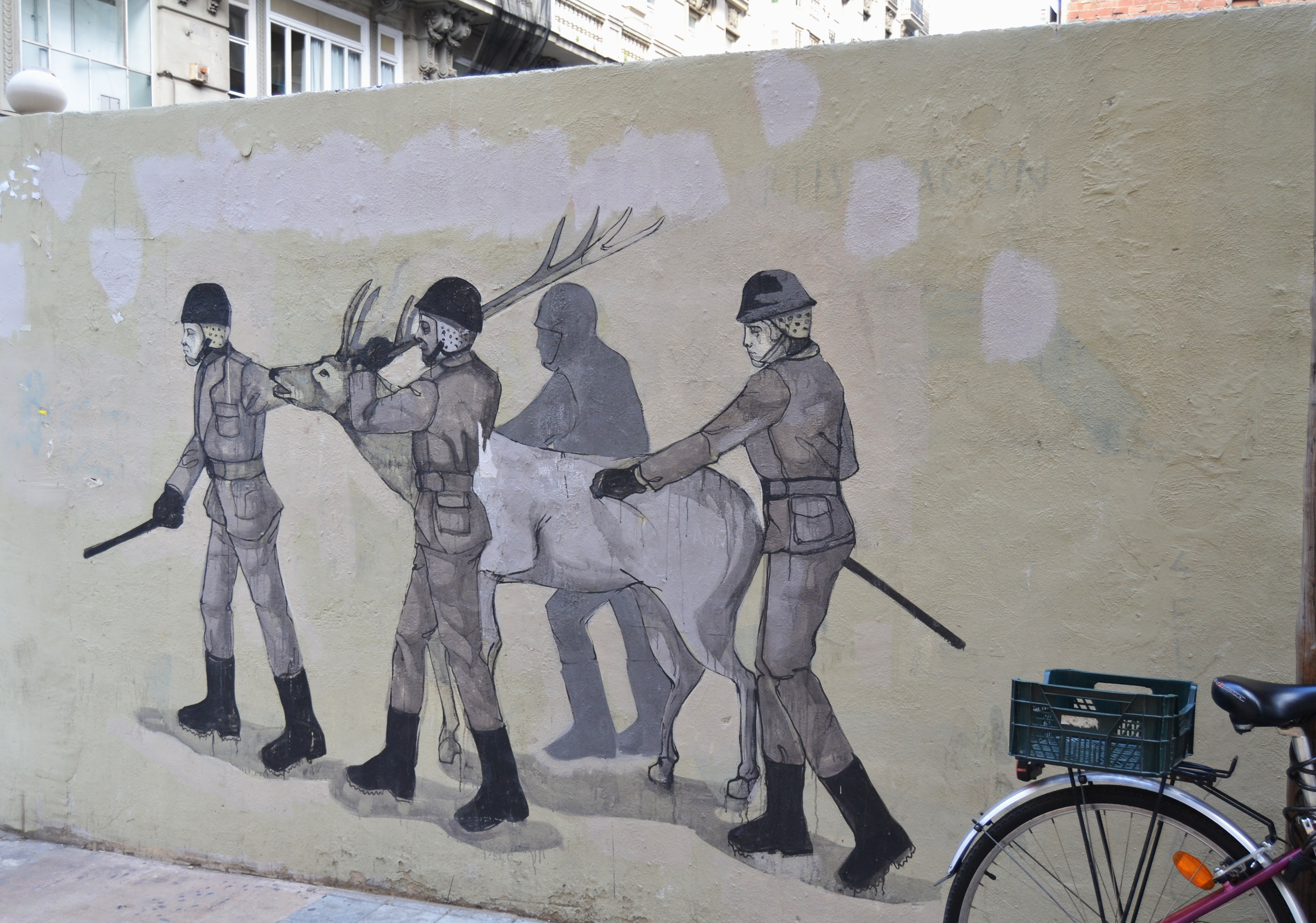 Mural al carrer del music Peydró, València.